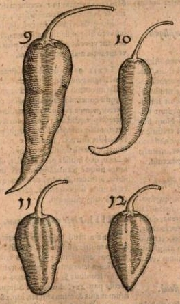 Genera 9-12 capsicorum. Gregorius de Regio, "De varietate capsicorum"